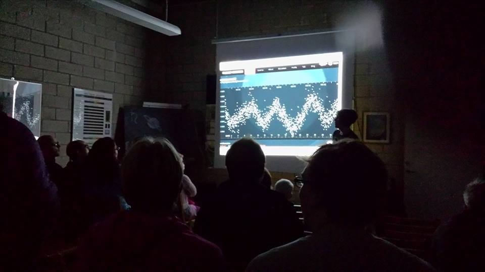 Föredrag på Slottsskogsobservatoriet under Astronomins dag och natt 18 oktober 2014. Föredragshållare: Katja Lindblom.